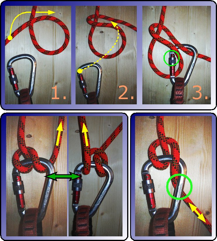 Halbmastwurf und Halbmastwurfsicherung